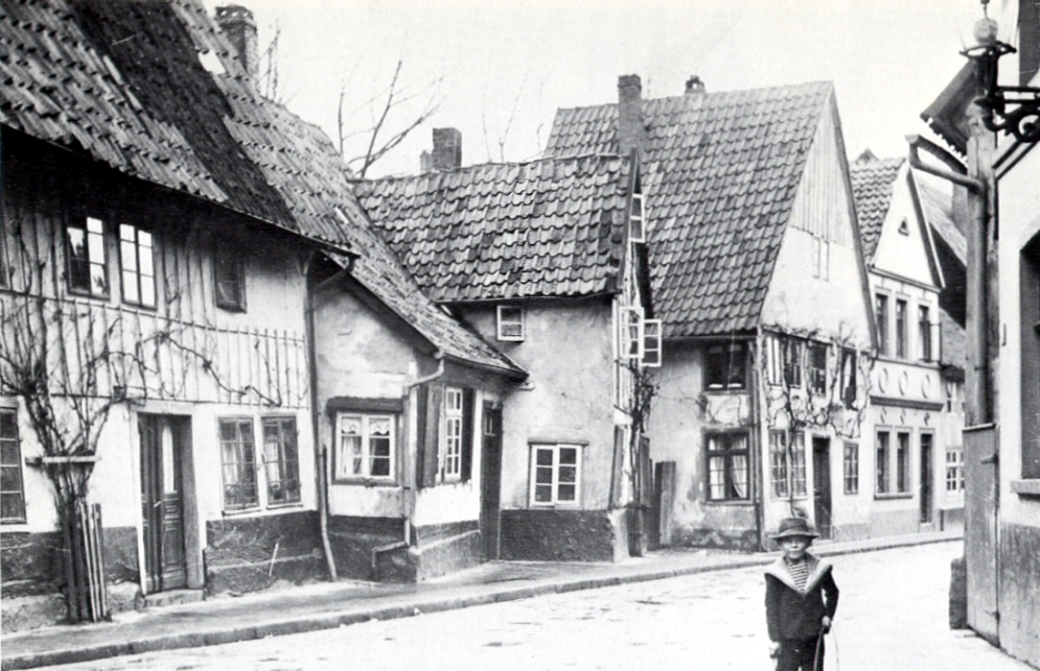 Zur Synagoge Herford: Das Gebetshaus an der Johannisstraße befand sich im Hinterhaus des Hauses in der Mitte des Bildes.